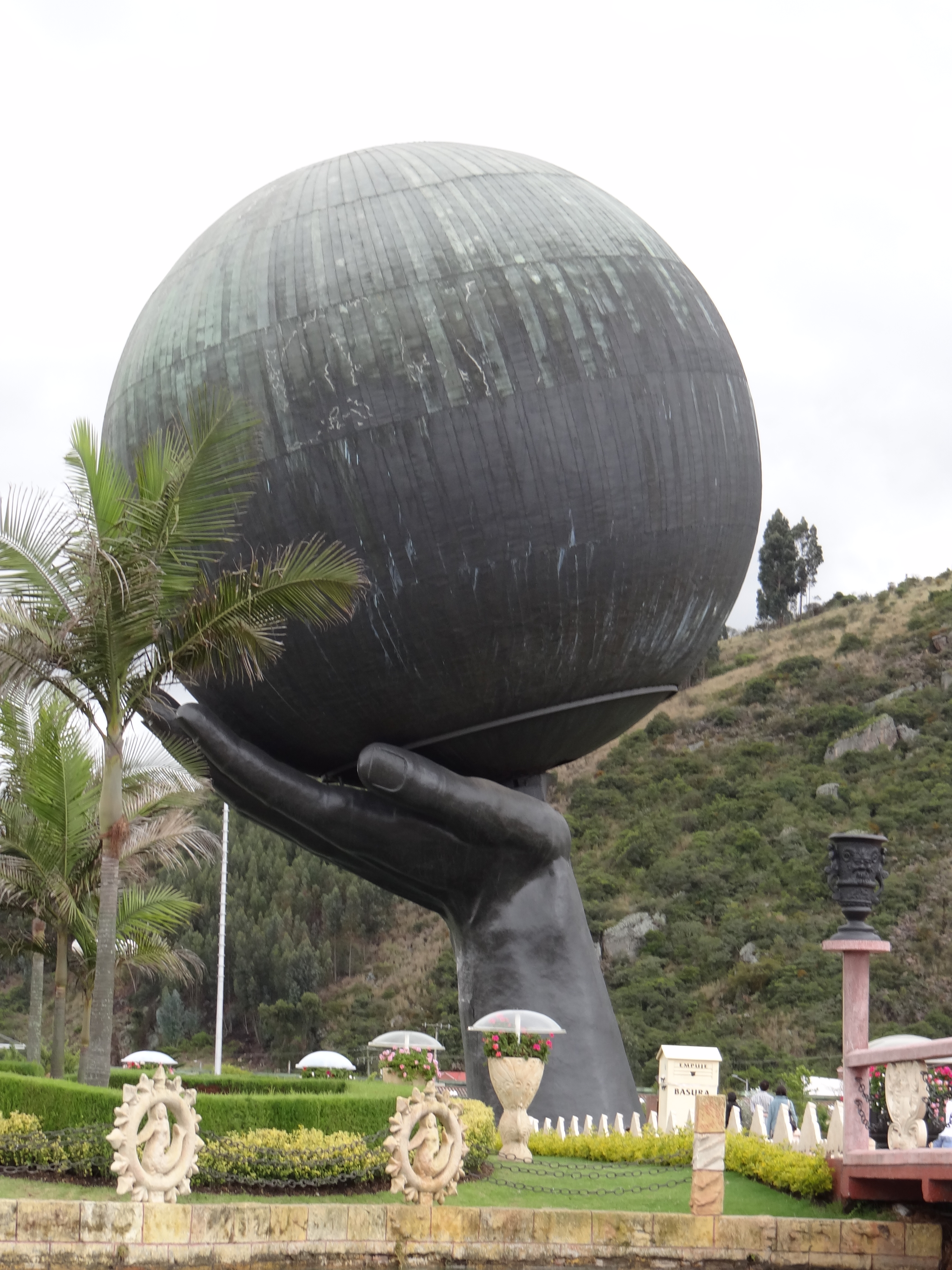 Ubicación: TOCANCIPA, CUNDINAMARCA